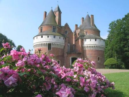 Château fort de Rambures - Un joyau del'architecture militaire du XVème siècle